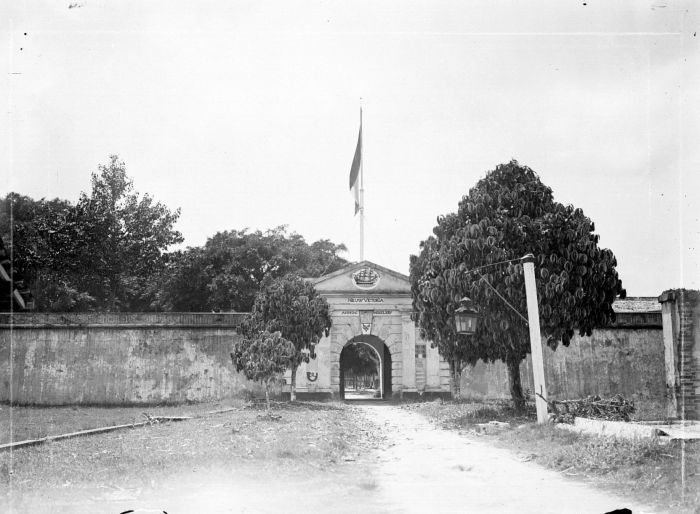 Negatief. Deze foto is gemaakt tijdens de Siboga Expeditie van 1899-1900. Waterpoort van het fort Nieuw Victoria